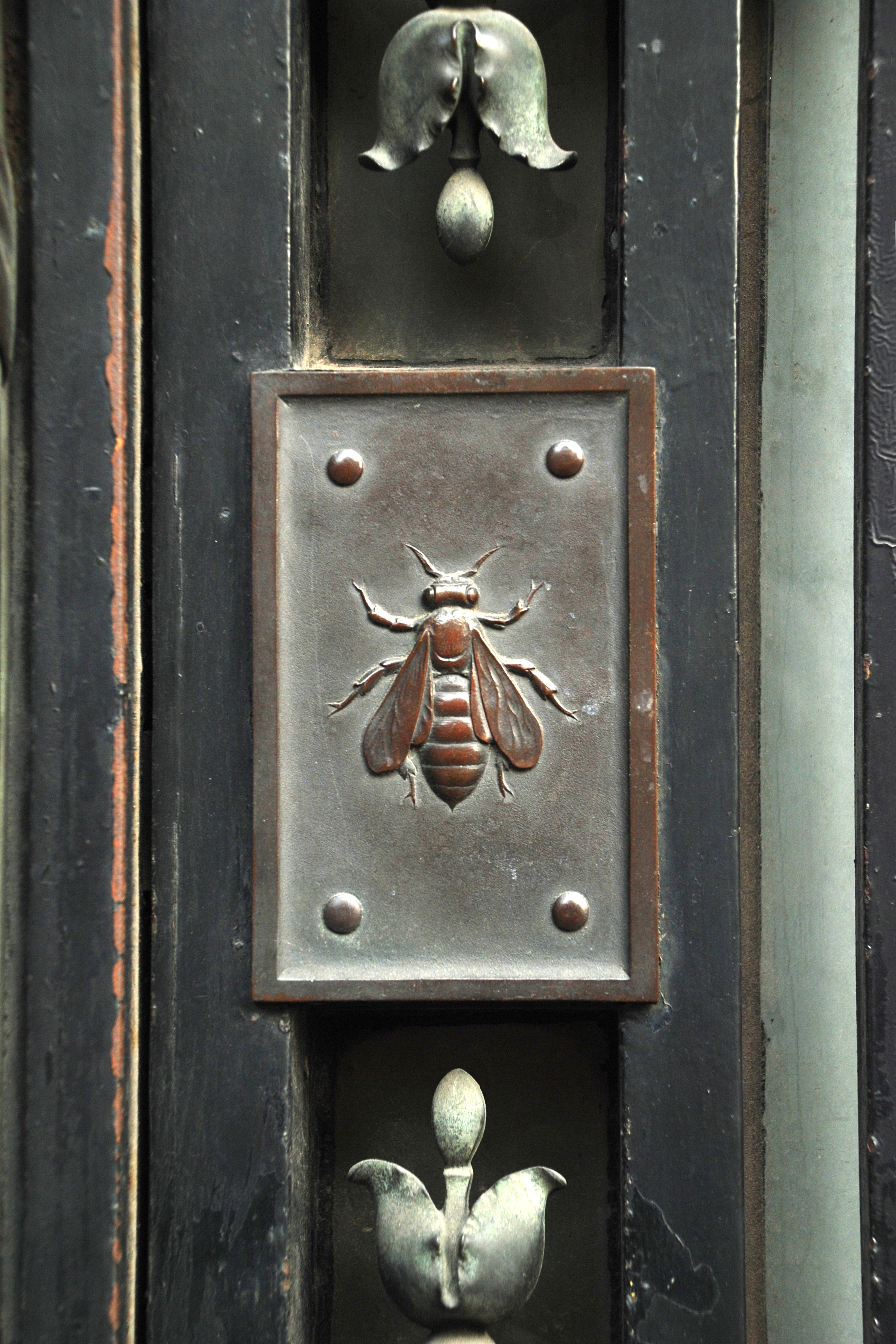 Belgique - Bruxelles - Caisse Générale d'Épargne et de Retraite